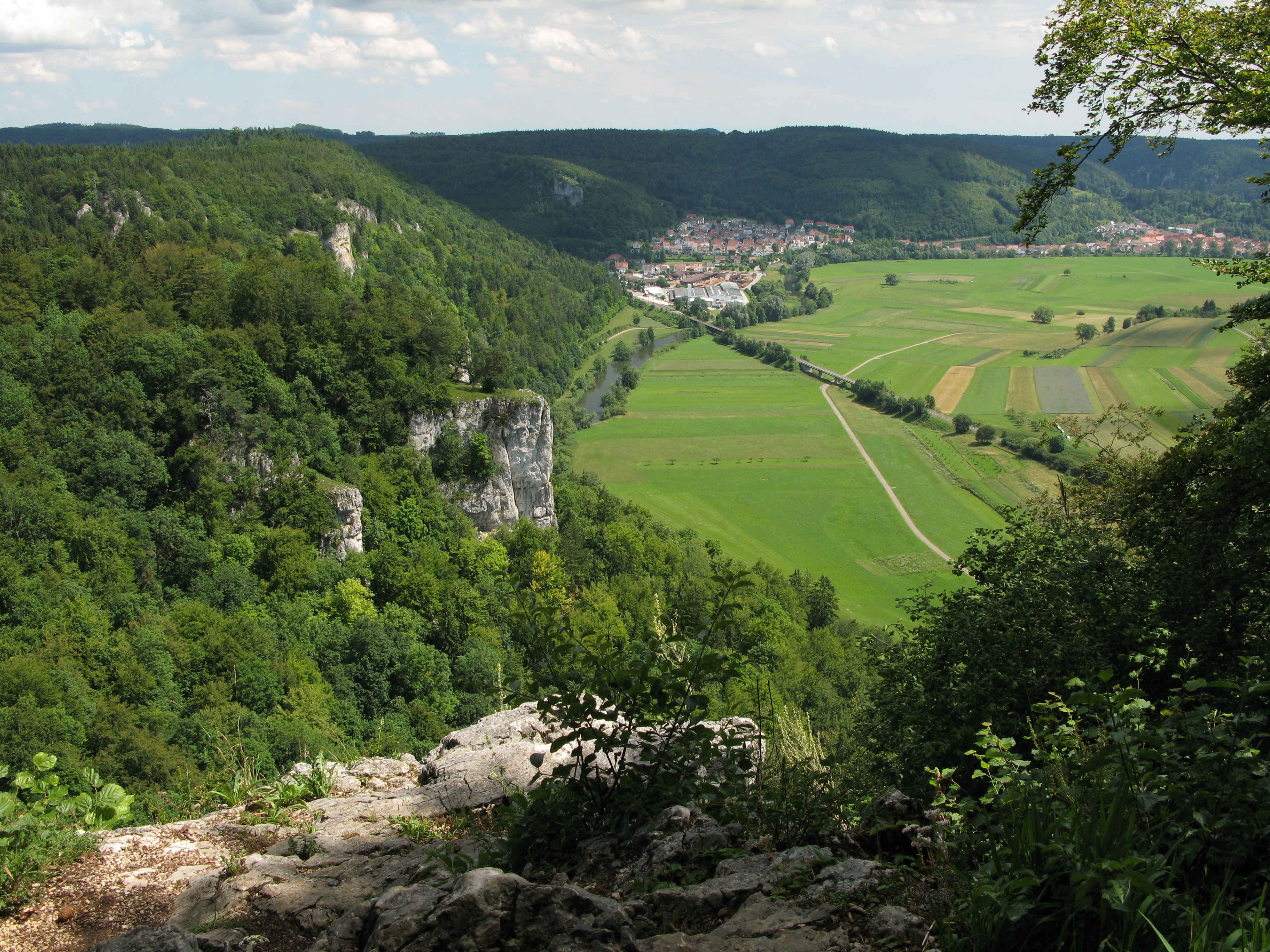 Die Donau und Fridingen gesehen bei der Kolbinger Höhle am Donauberglandweg auf der Schwäbischen Alb.